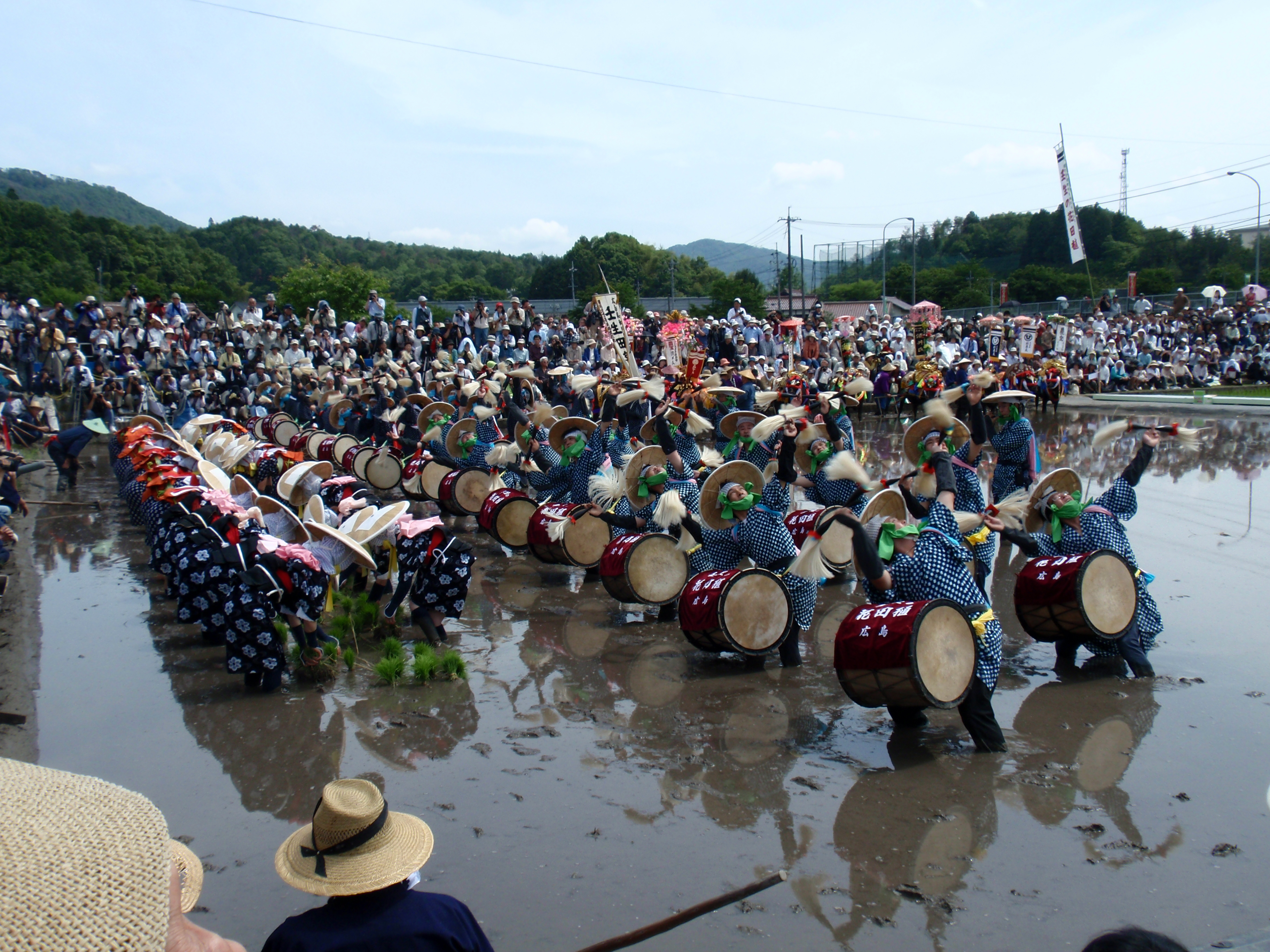 広島県北広島町で開催される壬生花田植